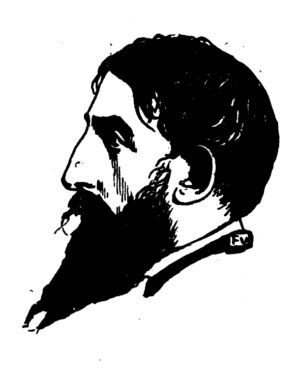 Portrait of French poet Jehan-Rictus (1867-1933) from Le Livre des masques (vol. II, 1898) by Remy de Gourmont (1858-1916)